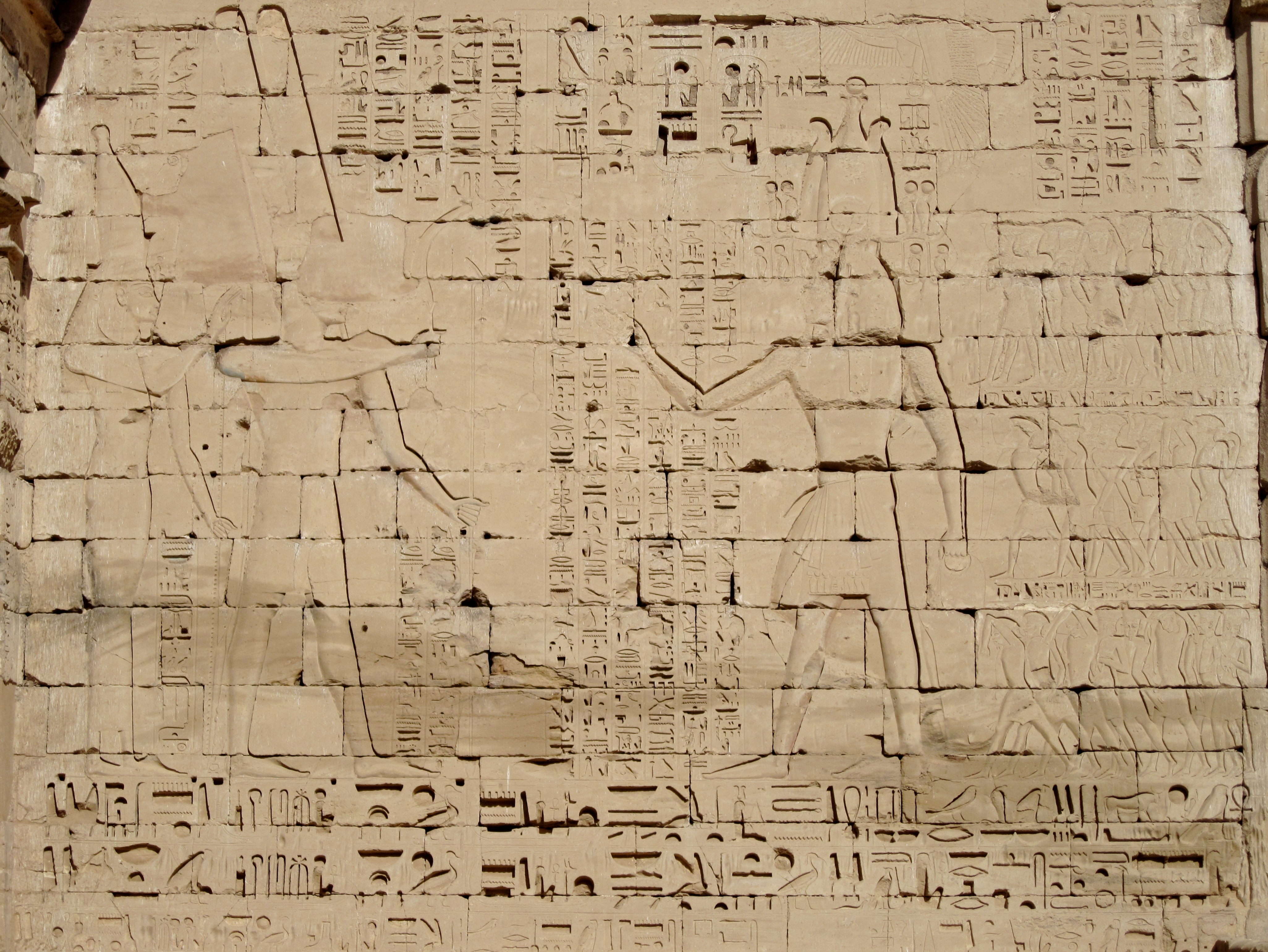 König (Pharao) Ramses III. führt Gefangene Peleset (Philister) vor Amun und Mut. Relief am zweiten Pylon im ersten Hof des Totentempels Ramses’ III. in Medinet Habu, Ägypten